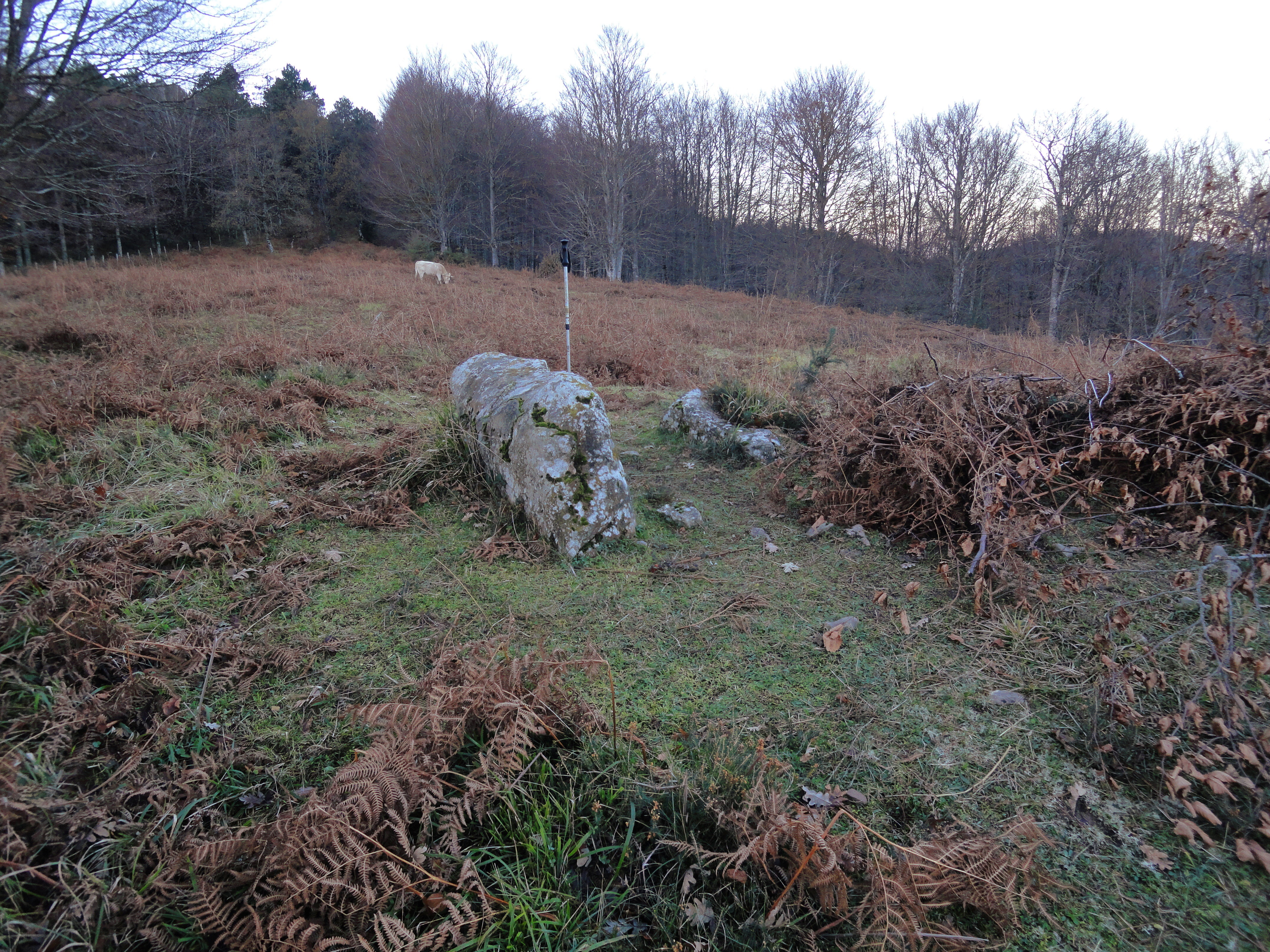 Otsaarte trikuharria